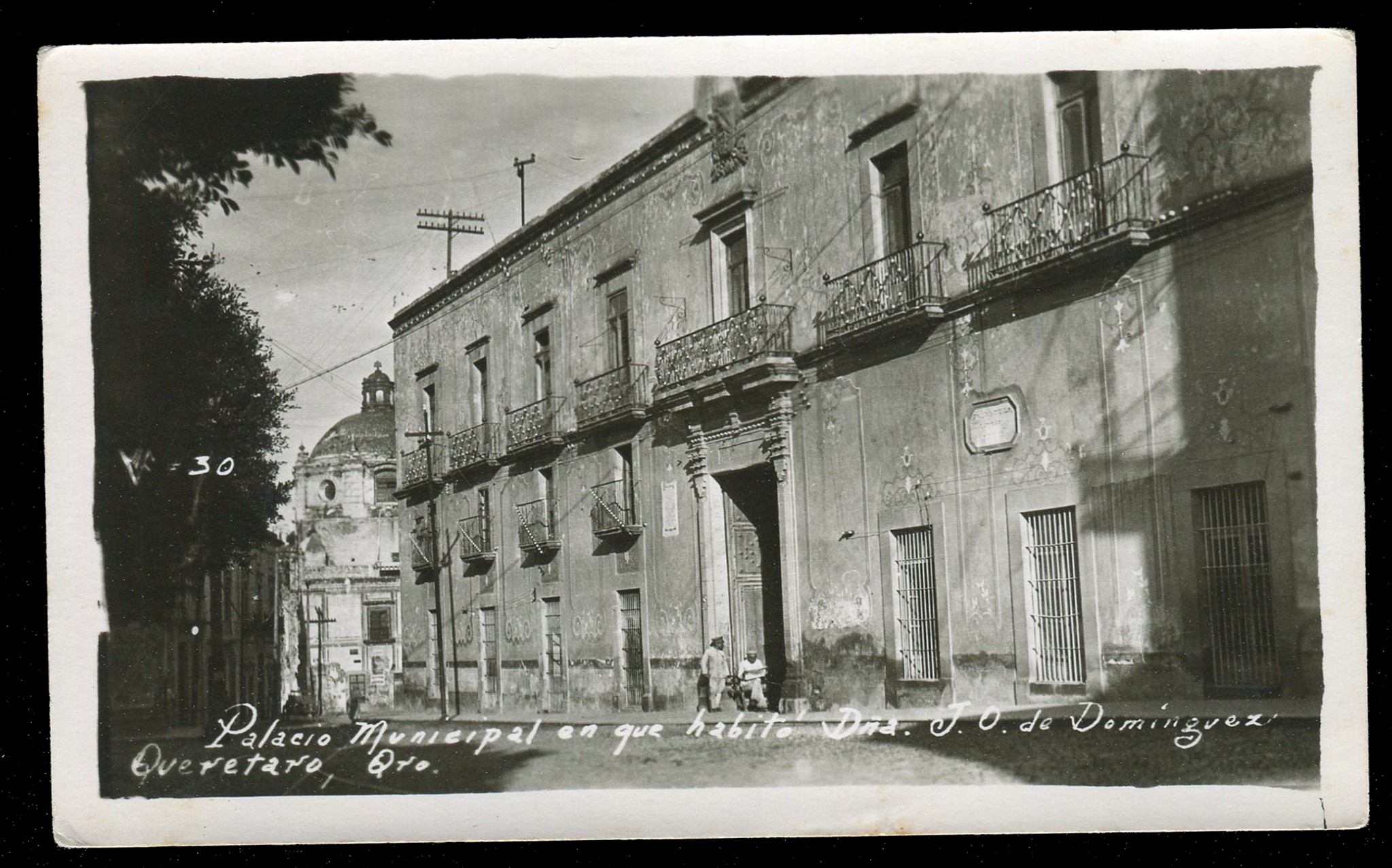 Palacio Municipal donde habitó Josefa Ortiz de Dominguez y se encontraba la cárcel que custodiaba Ignacio Pérez Álvarez. Circa 1930